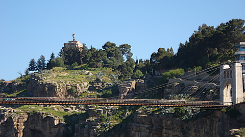 Le pont de Sidi M'Cid est un pont suspendu qui traverse les gorges du Rhummel et relie la médina de Constantine au centre hospitalo-universitaire. Sa construction décidée après l'ouverture de l'hôpital de la ville évite aux Constantinois de faire un long détour par le Pont d'El Kantara pour se rendre au CHU. Le monument aux morts de Constantine a été réalisé en hommage aux enfants de la ville morts durant la Première Guerre mondiale. Plus de 800 soldats, musulmans, chrétiens et juifs originaires de la ville de Constantine ont vu leur nom gravé sur des plaques en bronze